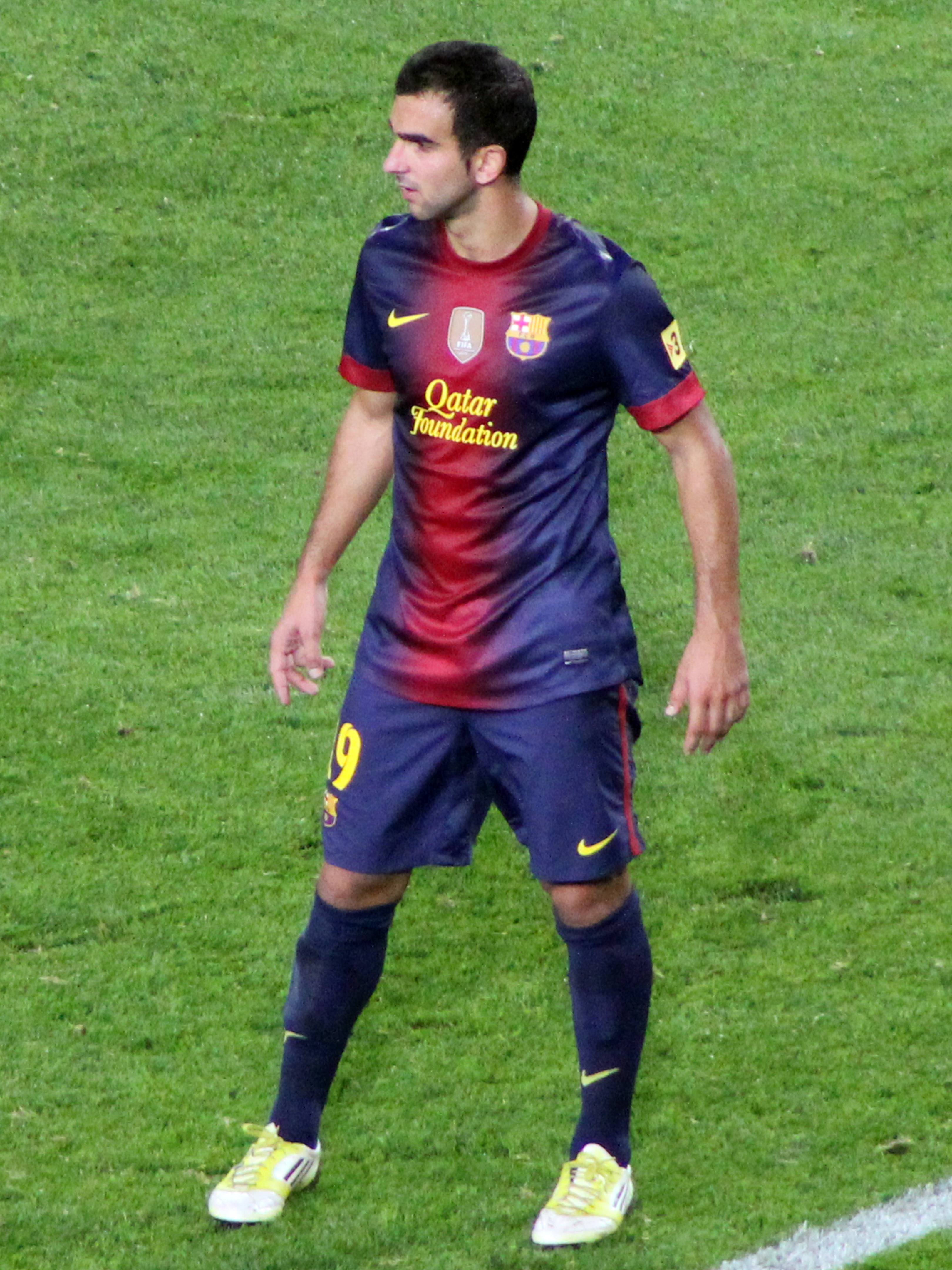 Martín Montoya con la camiseta del FC Barcelona, en un partido de dieciseisavos de Copa del Rey contra el Alavés, en el Camp Nou.